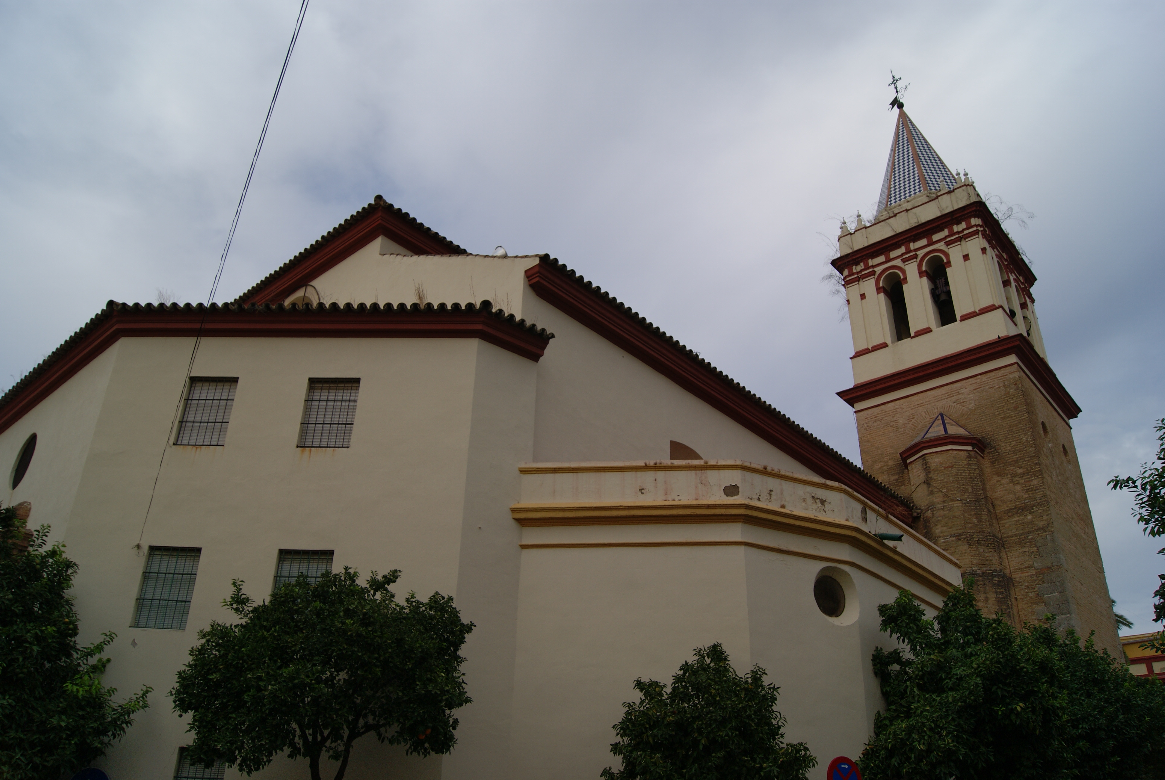 Iglesia parroquial de San Gil situada en pleno barrio de la La Macarena (Sevilla)